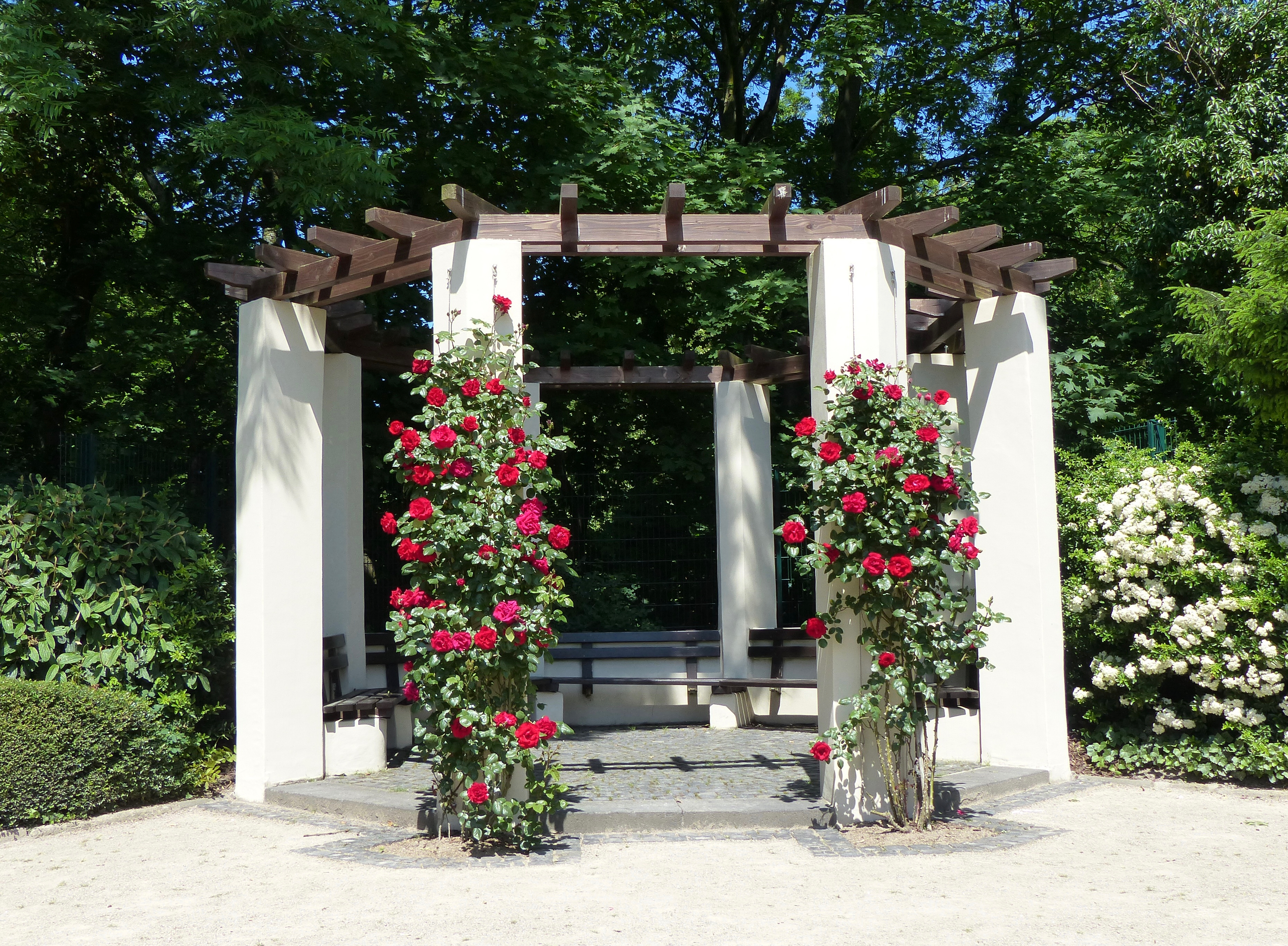 Rosengarten der Stadt Köln im Hilde-Domin-Park: Rosenpavillon